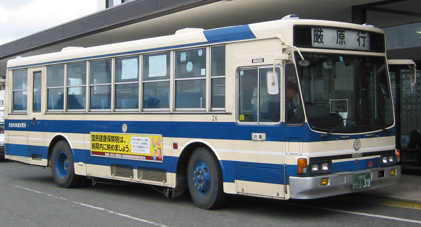 対馬交通（長崎県） 路線バスの車両